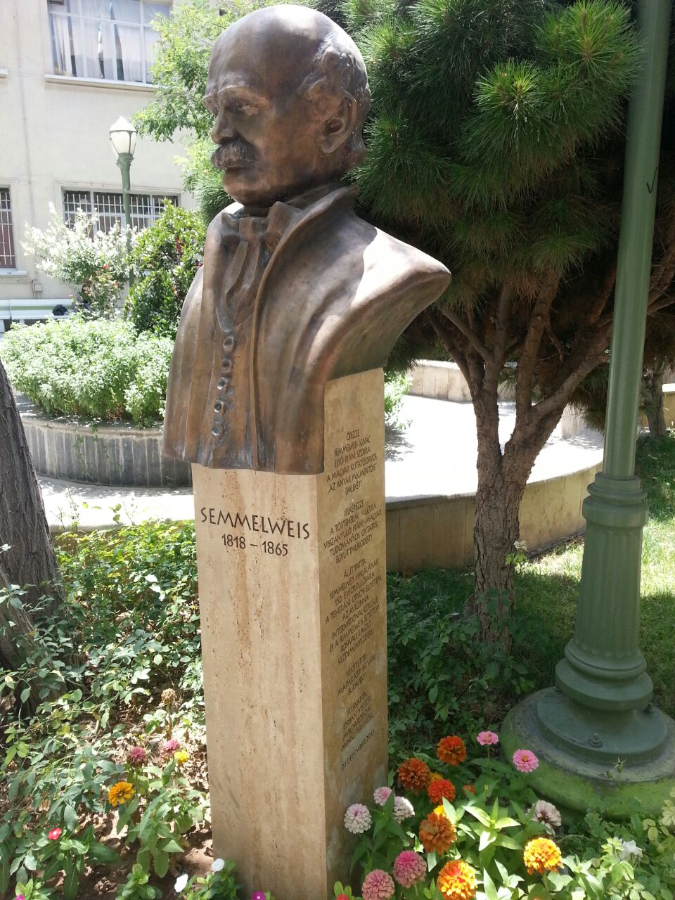 تندیس سملوایز در دانشگاه تهران